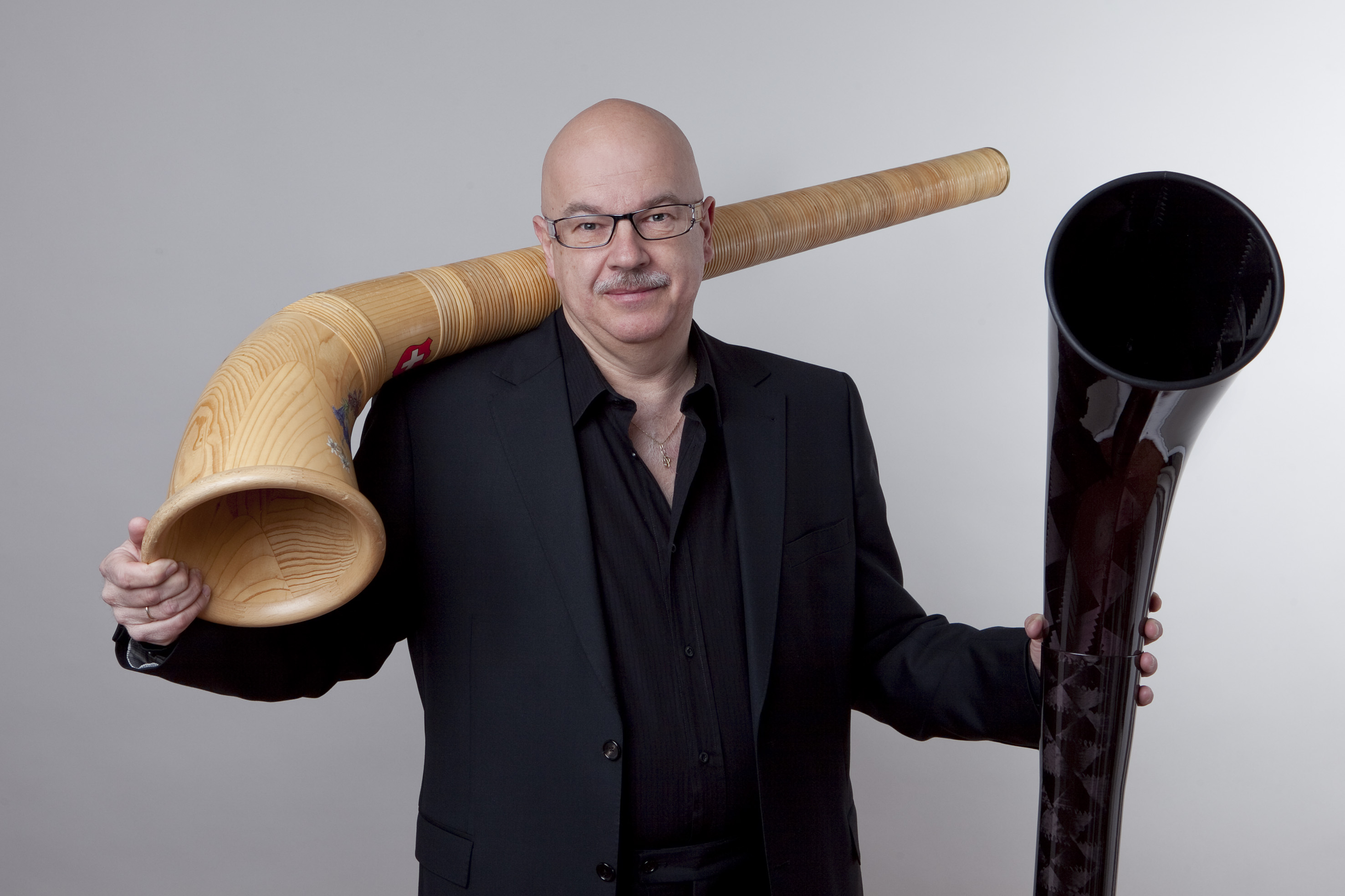 Holz oder Carbon, Hauptsache ALPHORN